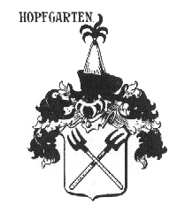 Wappen derer von Hopfgarten